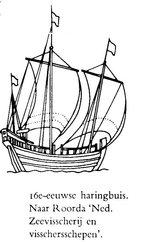 Haringbuis, tekening van J. Porcellis uit 1627